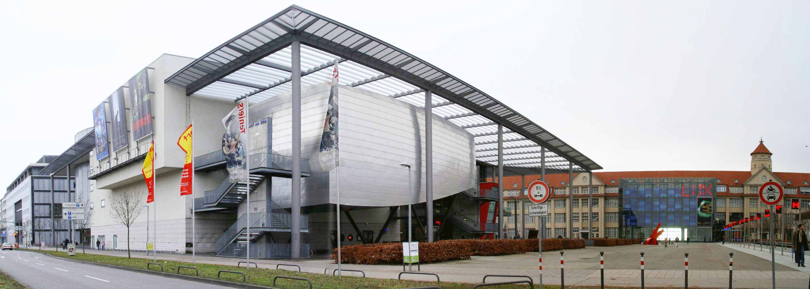 Fotografiert von Martin Dürrschnabel Datum 19.02.2006 Kamera: Sony DSC F717 Kino am ZKM Karlsruhe Datum 19.02.2006